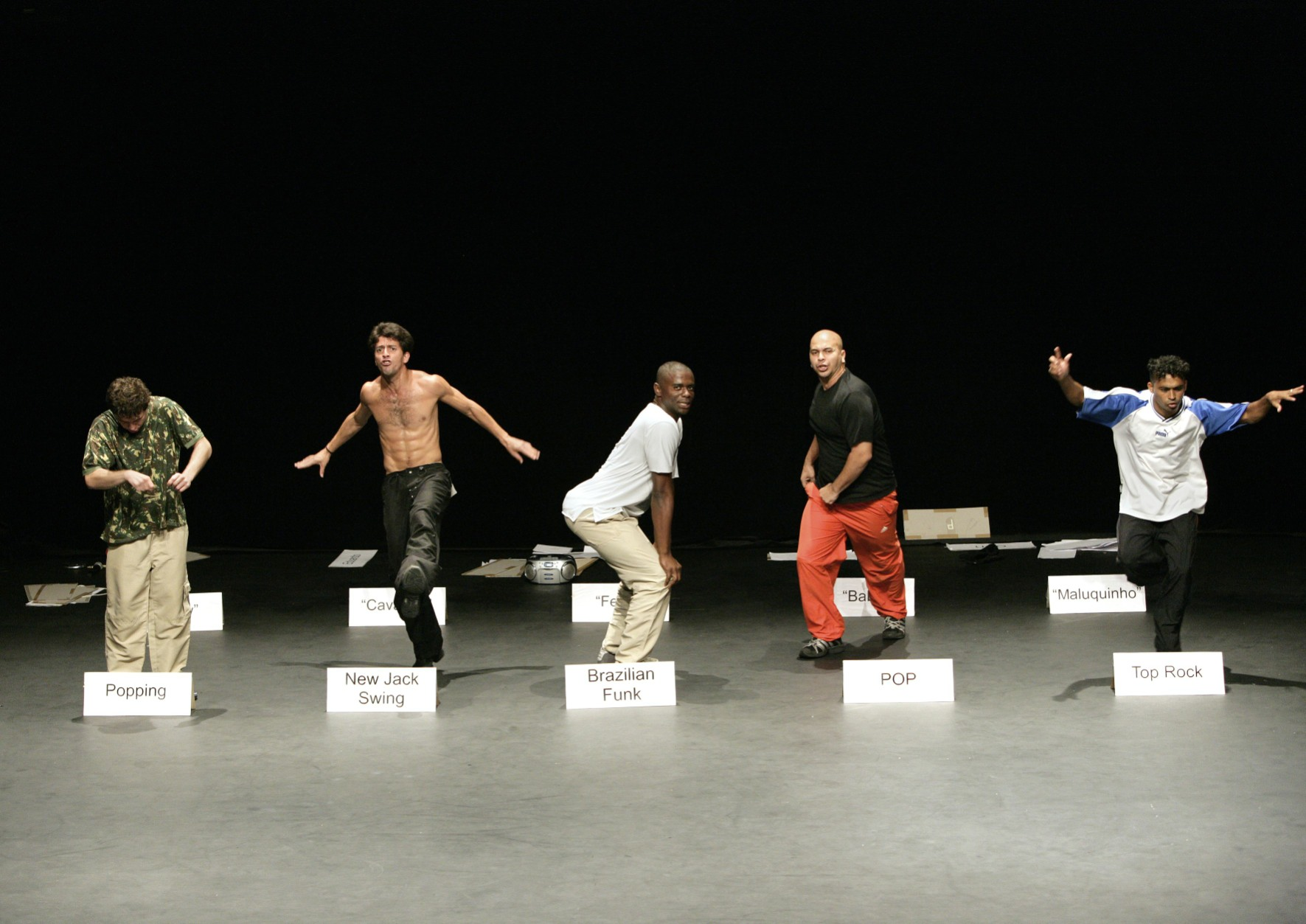 Peça satiriza alguns tabus das danças urbanas.